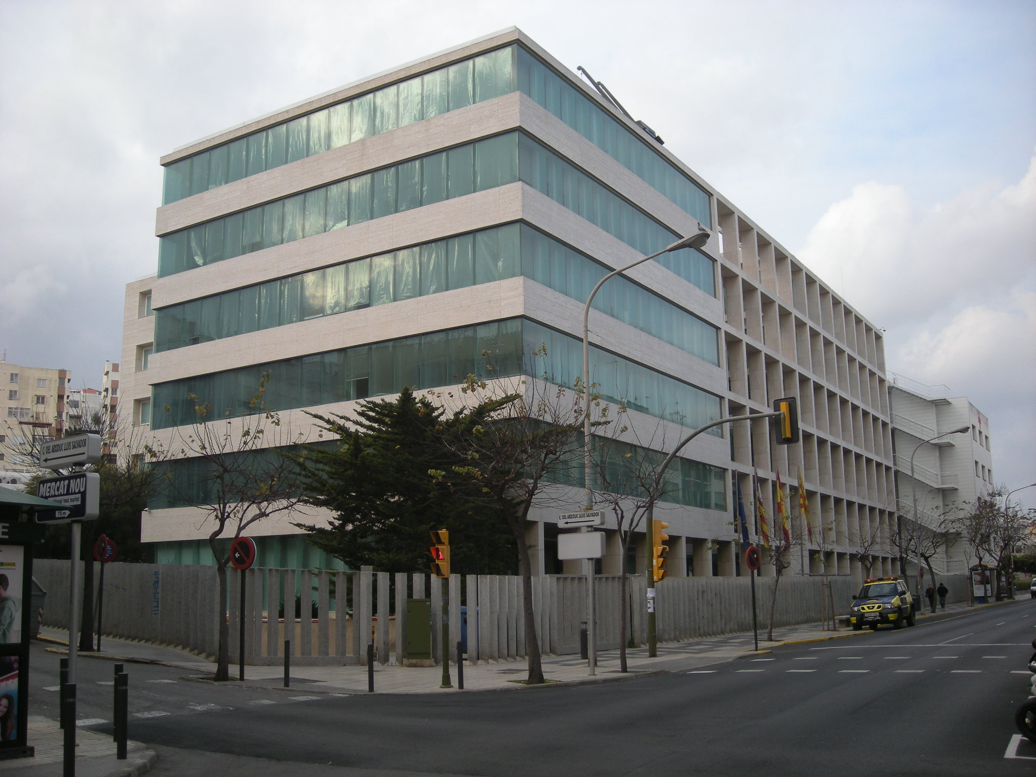 Seu del Consell Insular d'Eivissa